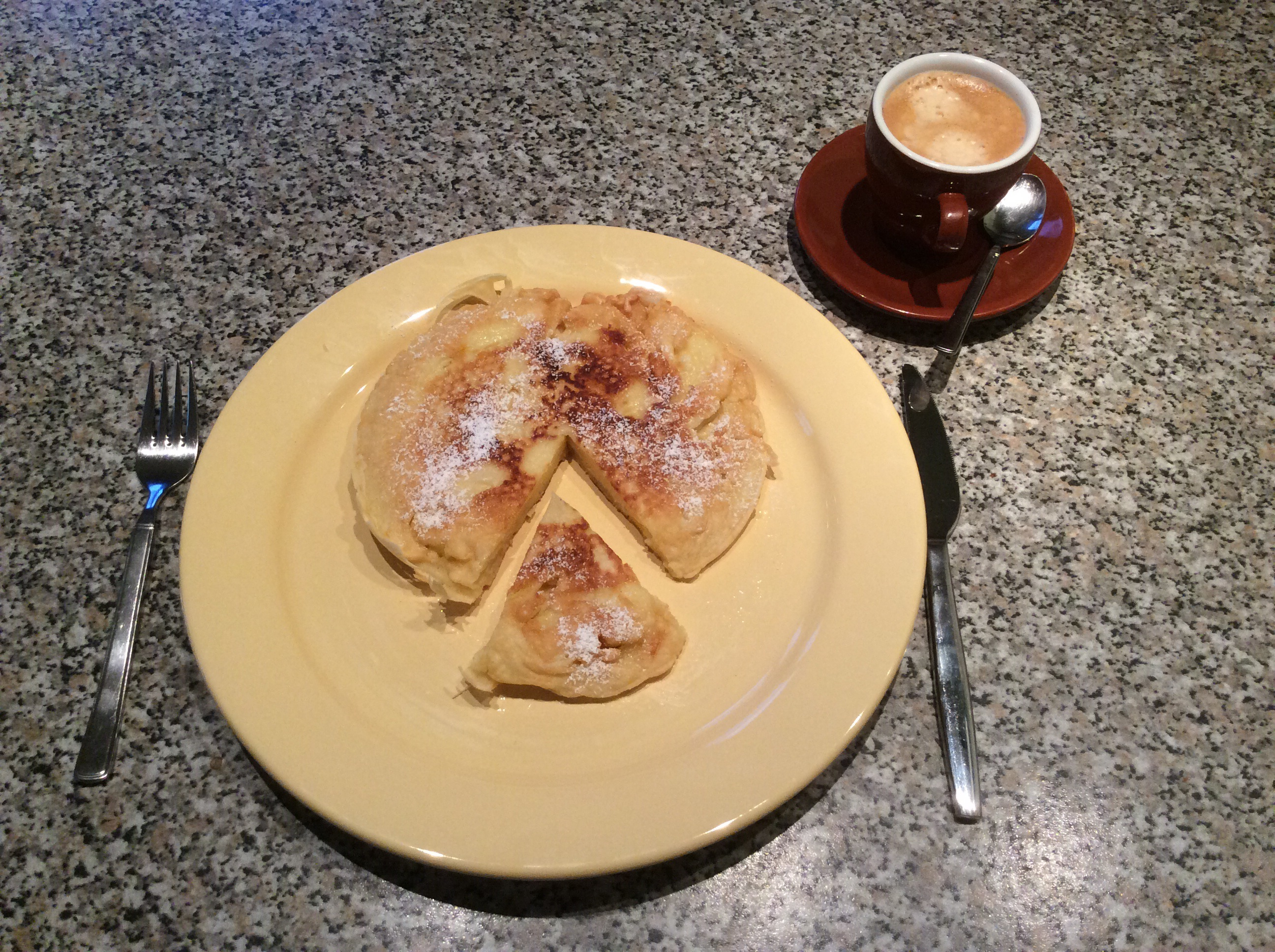 Vaute ou beignet aux pommes, crêpes épaisses en Lorraine